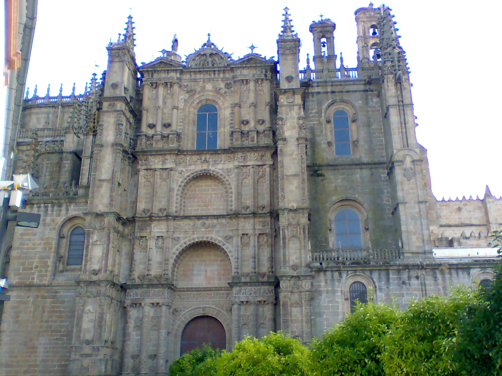 Catedral de Plasencia